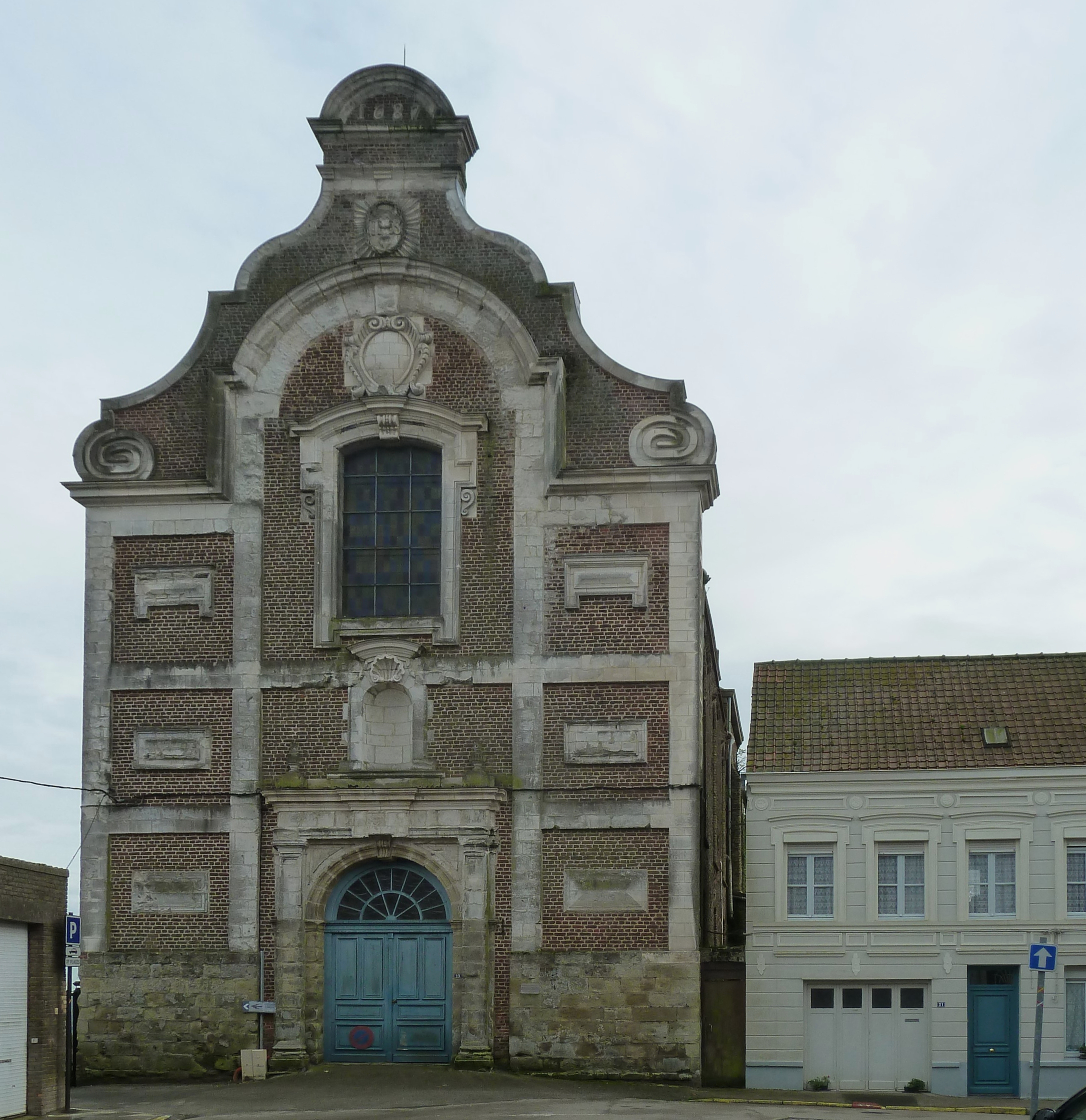 La chapelle des Jésuites Cassel, Nord.- Nord-Pas-de-Calais .